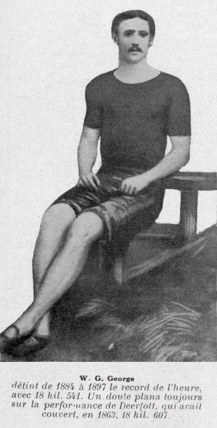 W. G. George, british world recordman of the pedestrian hour beetwen 1884 and 1897 (18.541km).